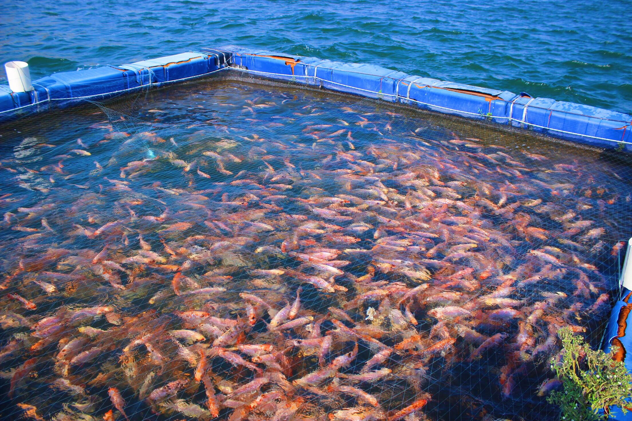 Criadero de peces dentro de la presa de Zimapán del lado de Xodhé